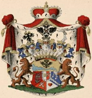 Suvorov-Rõmnikski suguvõsa krahvivapp ja Italiiski suguvõsa vürstivapp